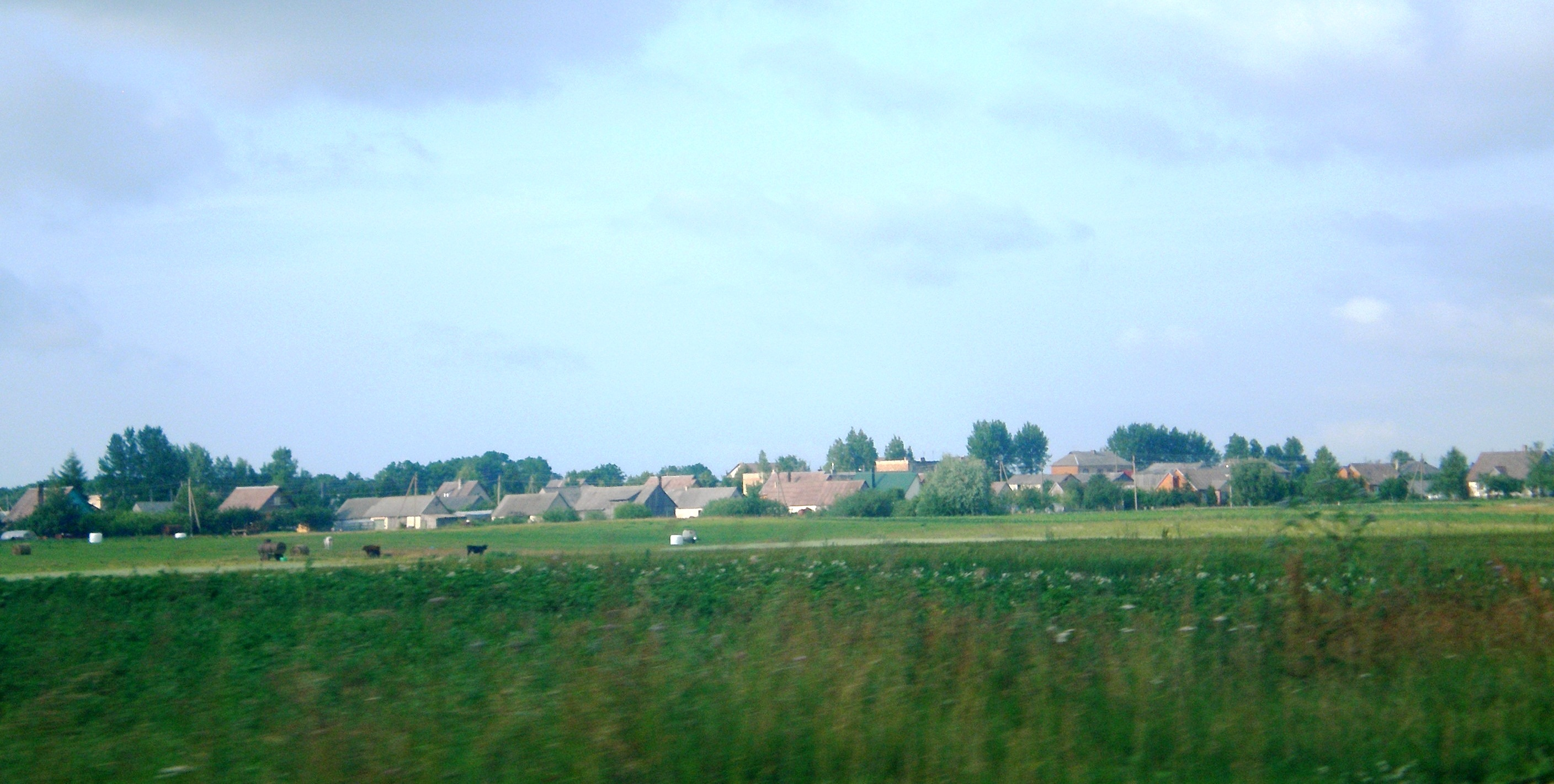 Plinkaigalis, Kėdainių raj.